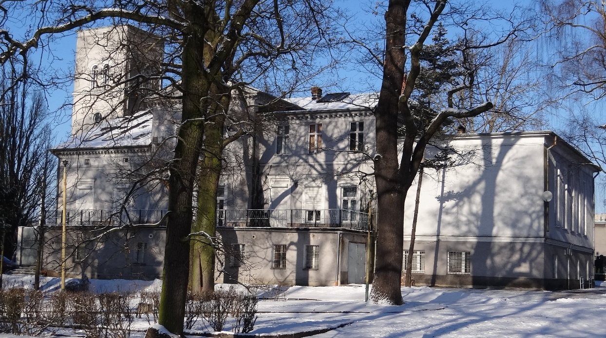 Byłe niemieckie kasyno oficerskie, obecnie Dom Kultury Kolejarza